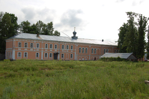 Современная фотография сестринского корпуса Одрино-Николаевского монастыря.